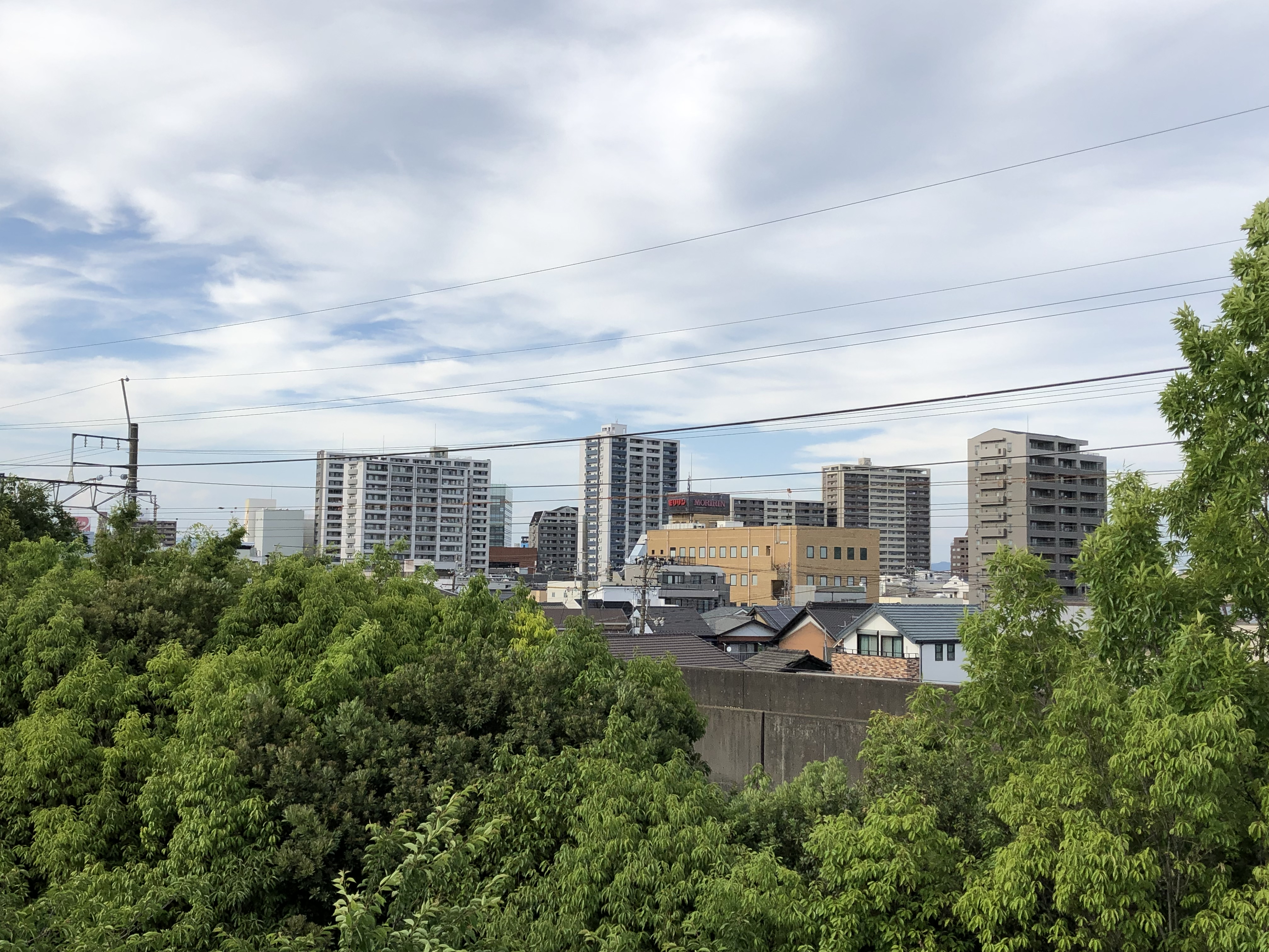 梅ヶ枝公園展望台から望む尾張一宮駅周辺